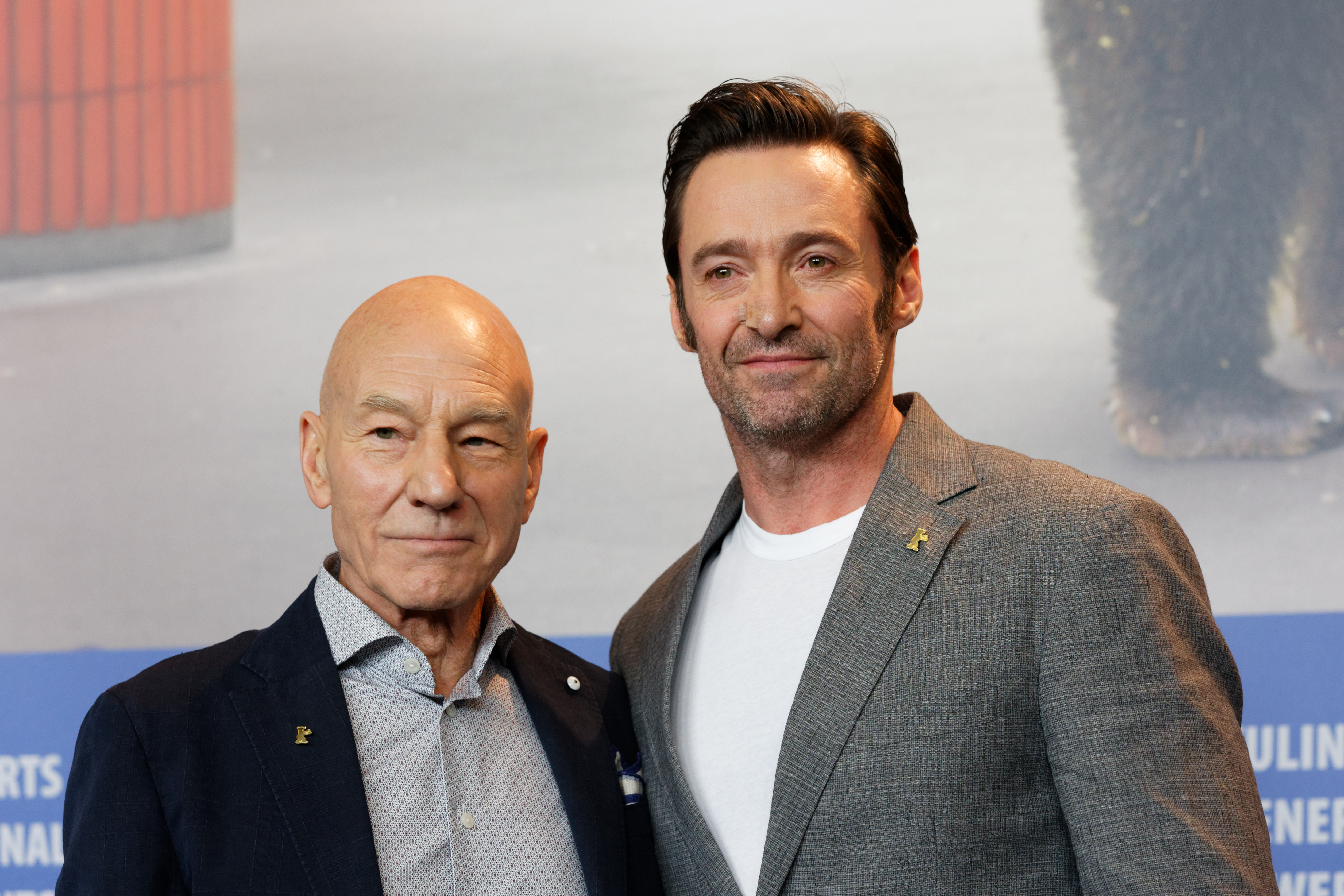 Patrick Stewart und Hugh Jackman bei der Pressekonferenz zu Logan bei der Berlinale 2017